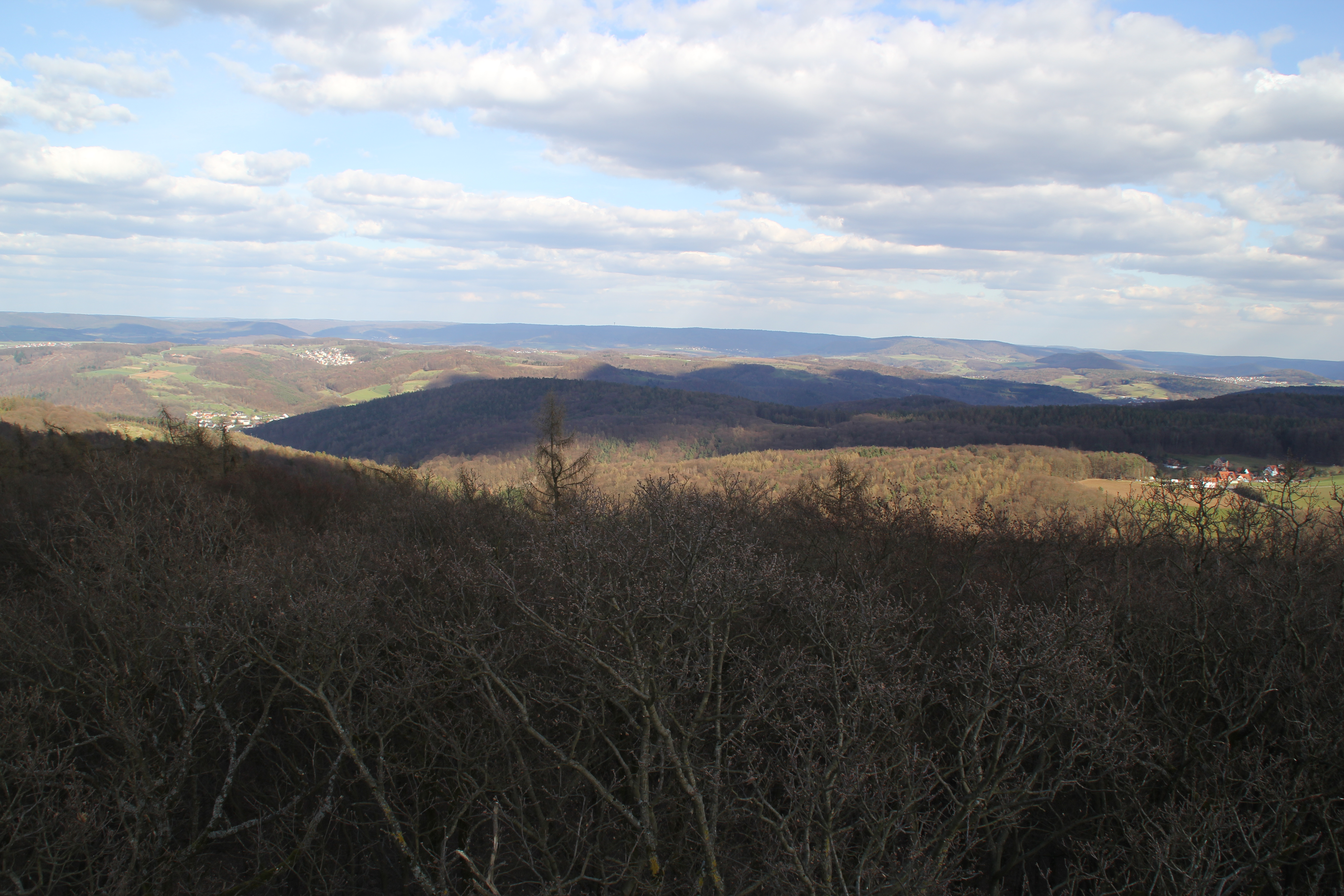 Der mittlere Kahlgrund im Landkreis Aschaffenburg, Bayern. Betrachtet vom Ludwigsturm auf dem Hahnenkamm bei Alzenau. Zu sehen sind (v. links n. rechts): Omersbach, Niedersteinbach, Dörnsteinbach, Edelbach, Oberschur, Vormwald, Eichenberg, Schimborn, Kleinhemsbach und Rottenberg